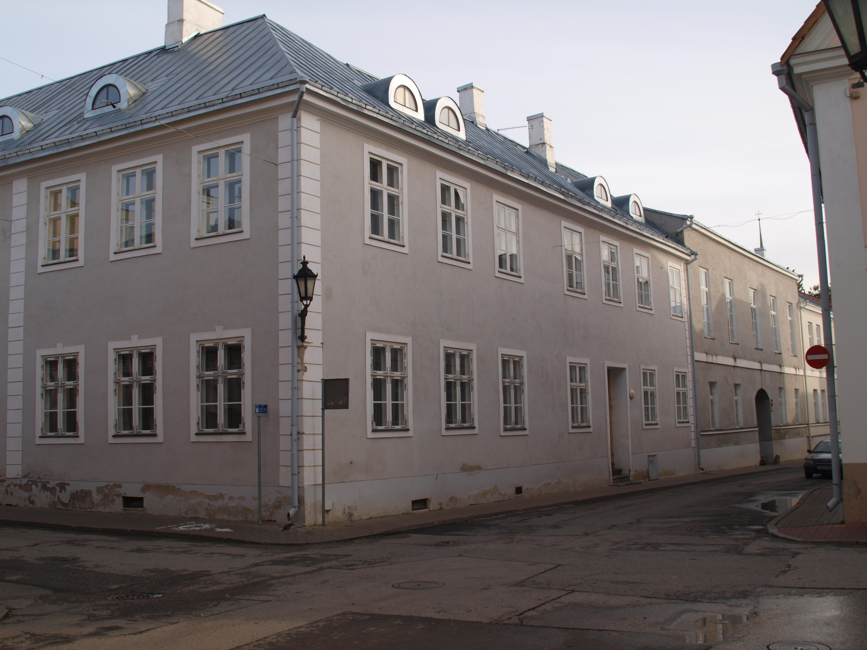 Koolihooned Tartus Jaani 3/5, Munga 12, Rüütli 20, 18-19.saj.